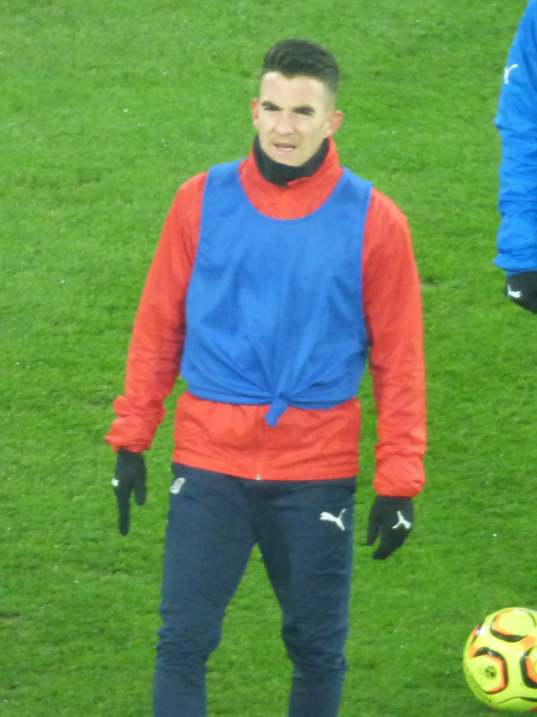 Steve Beusnard avant le match RC Lens / AS Béziers, comptant pour la 23ème journée du championnat de France de football de Ligue 2 2018-2019, le 4 février 2019, au Stade Bollaert-Delelis.